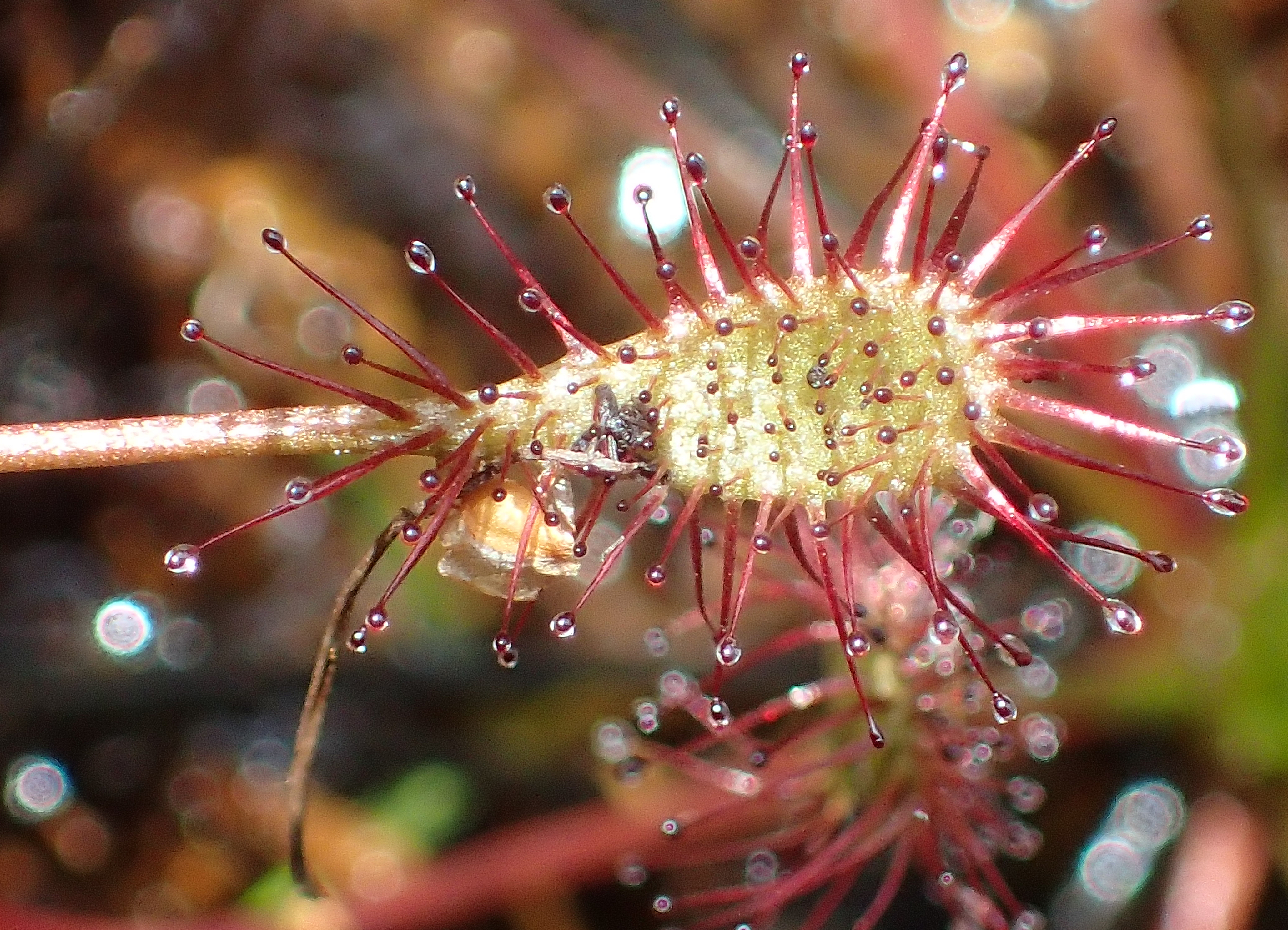 Blatt von Drosera intermedia aus Deutschland, Brandenburg, Naturpark Niederlausitzer Heidelandschaft am 6. August 2017